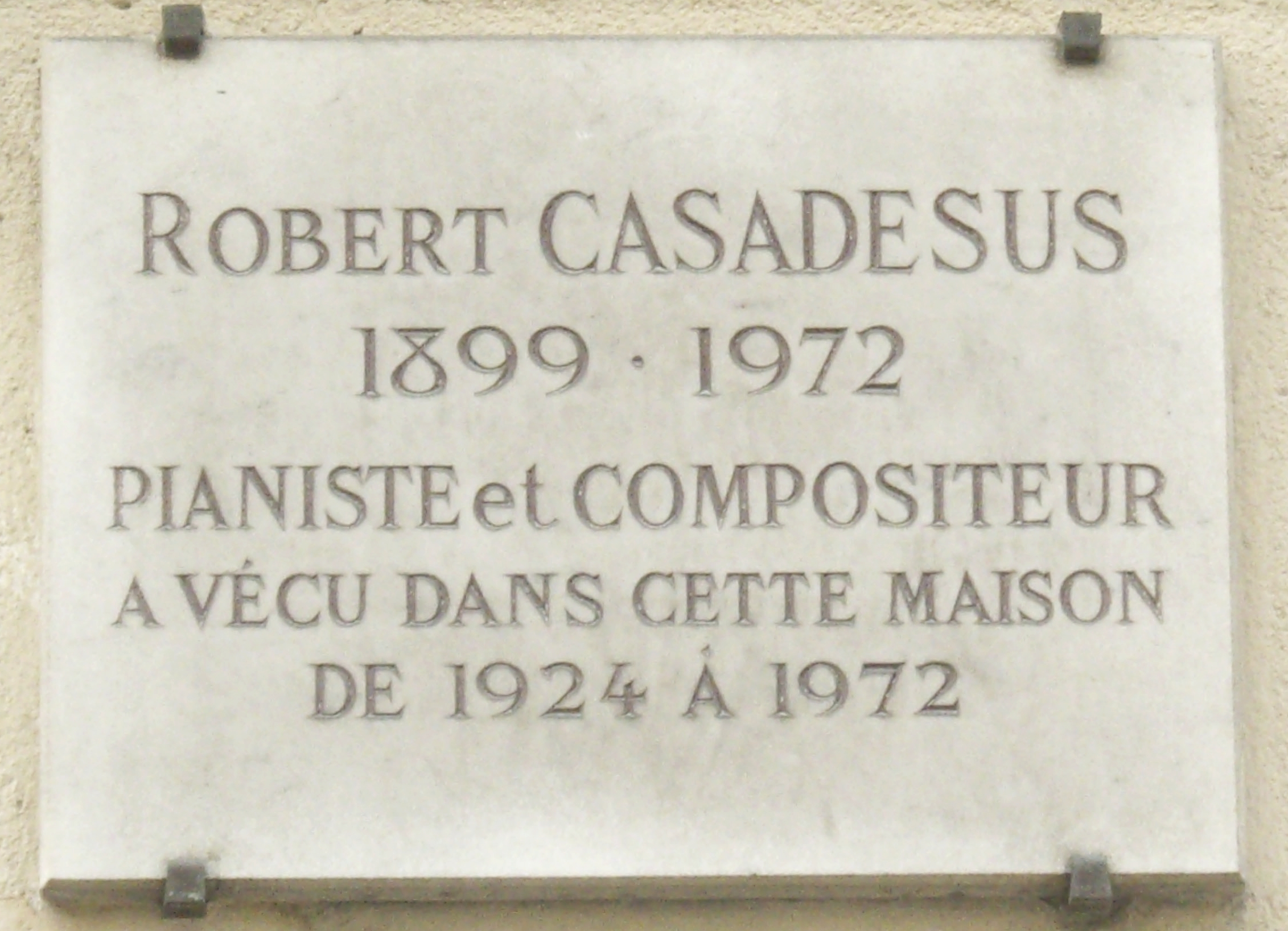 Plaque apposée au n° 54 de la rue Vaneau, Paris 7e, où vécut le pianiste et compositeur Robert Casadesus (1899-1972) de 1924 à 1972.